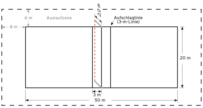 Faustball Spielfeld mit Abmessungen und Auslaufzone (schematisch)